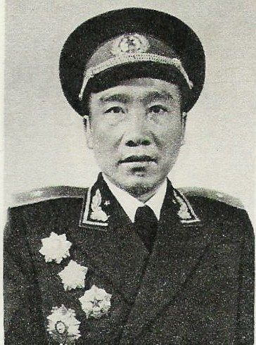 中文（中国大陆）: 段苏权少将1955年授衔照